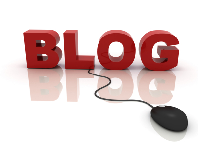 nmuuuu